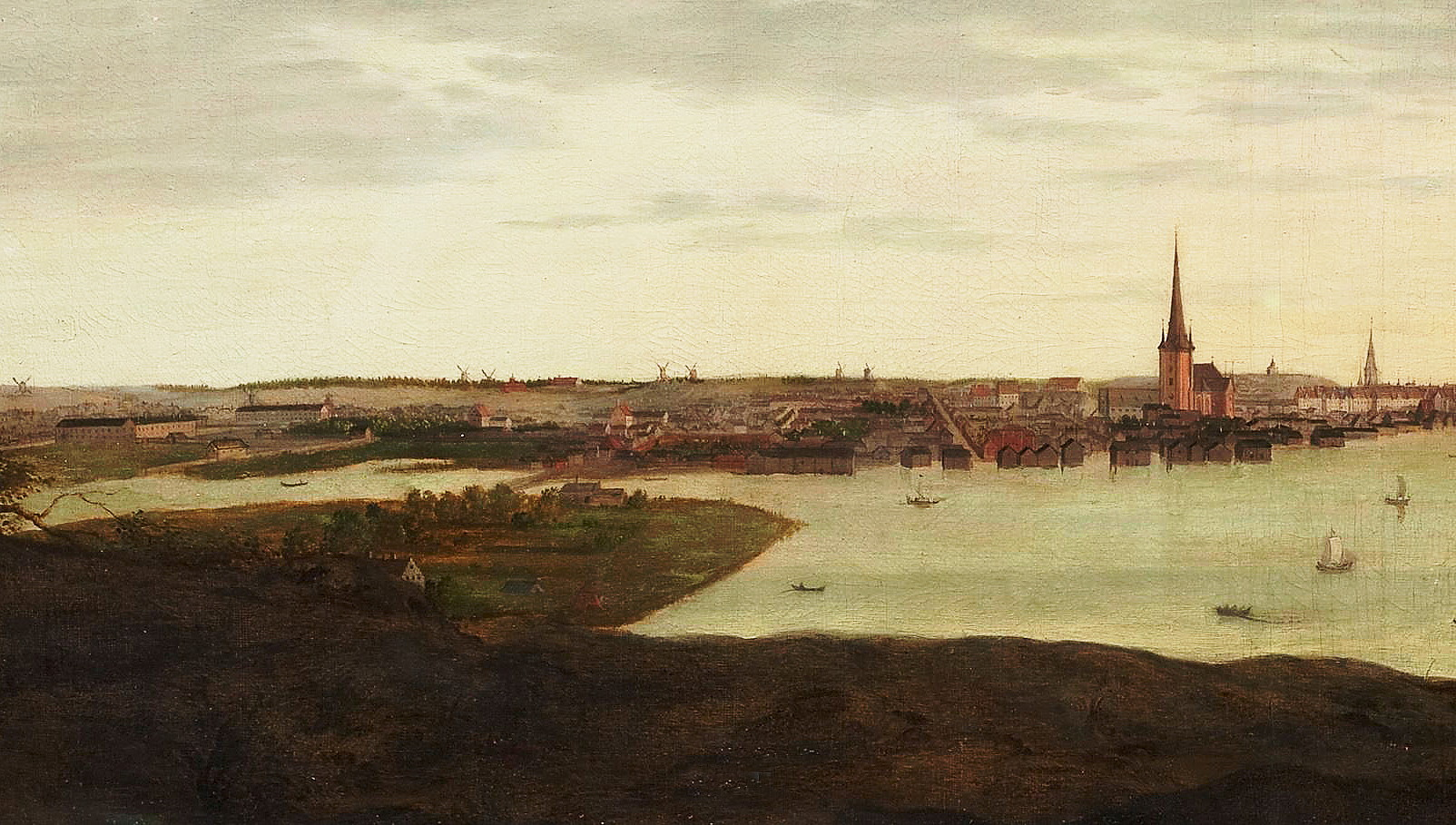 Utsikt över Stockholm och Klara sjö från Kungsklippan (del av tavlan). Till höger syns Klara kyrka, till vänster Gamla Kungsholmsbron.